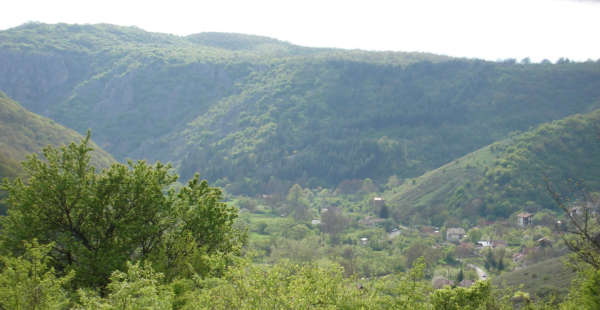 Централната част на село Беренде извор, гледана от североизток.